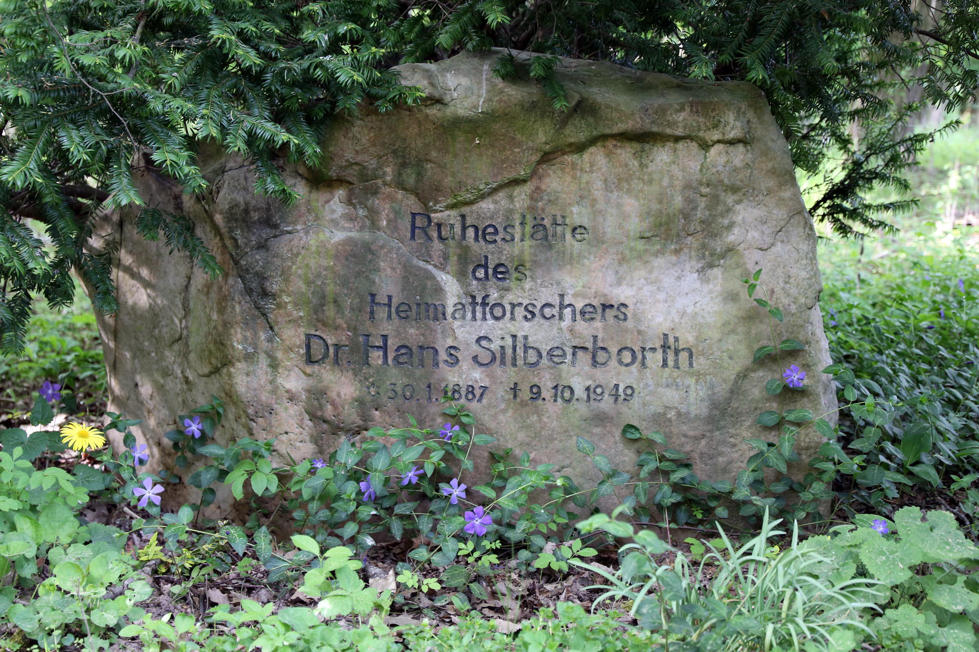 Ruhestätte des Heimatforschers Hans Silberborth (geb. 30. Januar 1887 in Magdeburg; gest. 9. Oktober 1949 in Nordhausen) im "Wilden Hölzchen" beim Harzrigi in Petersdorf. Silberborth war Gymnasiallehrer, Stadtverordneter, Heimatforscher, Museums- und Archivleiter in Nordhausen. Er war maßgeblich an dem Wiederaufbau des Nordhäuser Stadtarchivs nach 1945 beteiligt.